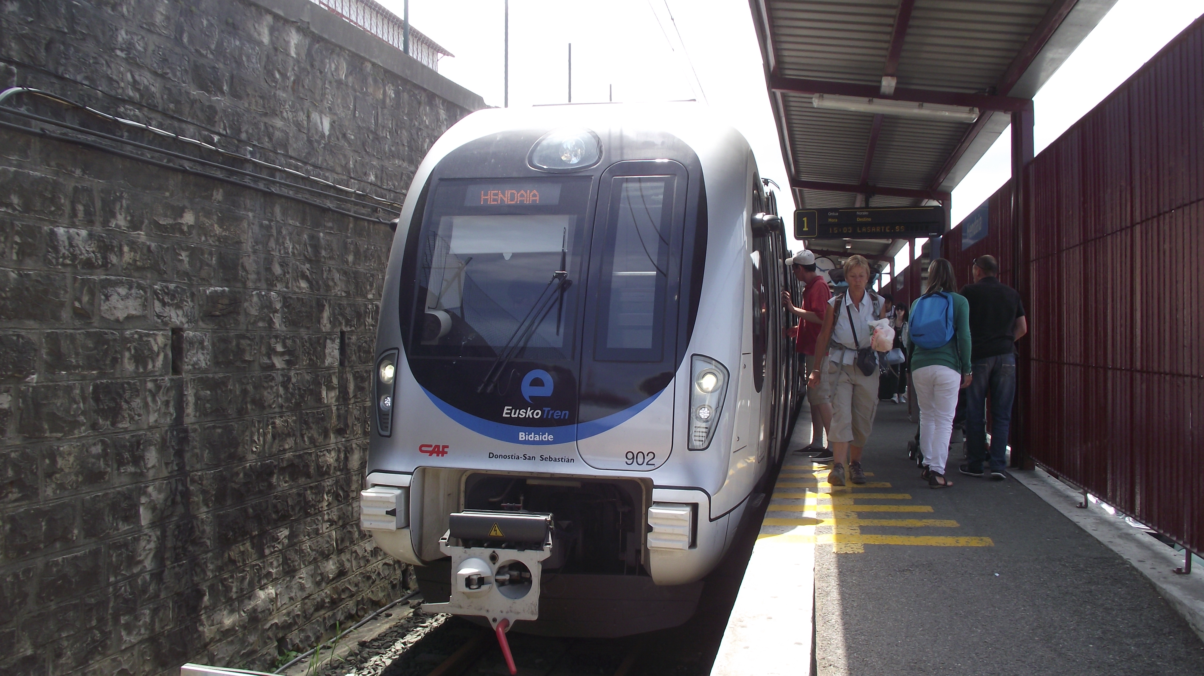 Eindpunt van de Baskische meterspoorlijn in frankrijk